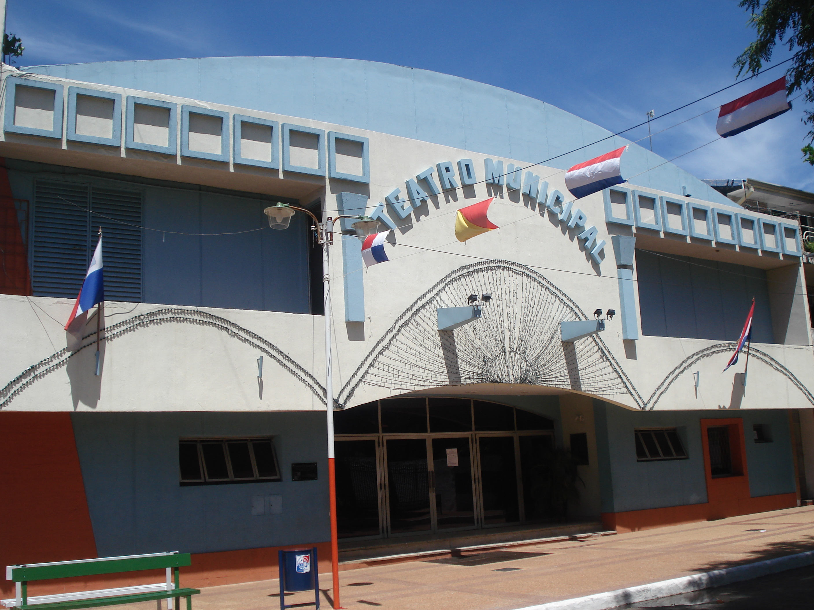 Teatro Municipal de Fernando de la Mora